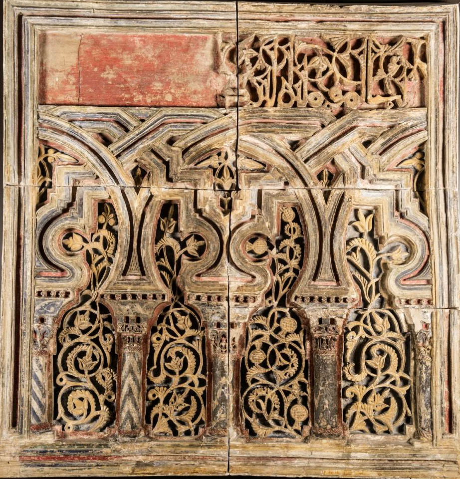 Panel decorativo (friso, siglo XI) del salón dorado de La Aljafería de Zaragoza (España). Se conserva desde 1869 en el Museo Arqueológico Nacional (España). N.º de inventario: 50440. Yeso policromado. Altura = 162 cm; Anchura = 151 cm. Descripción: Decoración que evoca una arquería entrelazada de arcos mixtilíneos y otros de herradura apuntados sobre columnas de capiteles compuestos y fustes variados, torsos y lisos, y con decoración pintada en zig-zag; vanos ciegos rellenos con ataurique y de largos tallos formando roleos y hojas disimétricas, digitadas y anilladas. En la zona superior inscripción cúfica ("... los fieles...") con prolongaciones vegetales. Conserva restos de policromía en rojo, azul, blanco y negro.